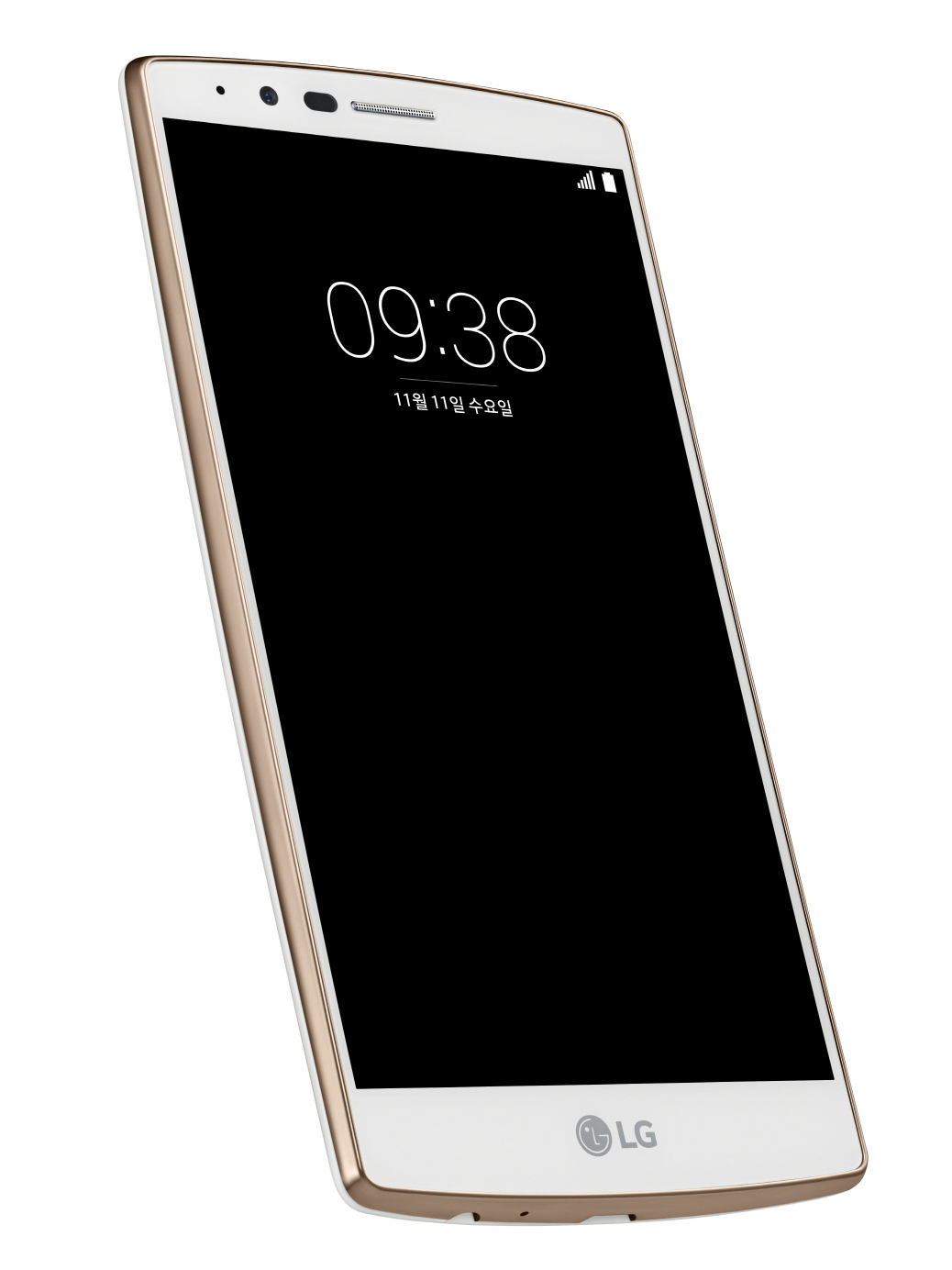 LG전자, ‘G4 화이트 골드 에디션’ 출시 ■ 11일부터 LG유플러스 시작으로 국내 출시 ■ 화이트와 골드 색상 조합으로 여성 및 젊은 사용자층 공략 ※ Social LG전자 ( 에서 관련 보도자료를 확인하실 수 있습니다